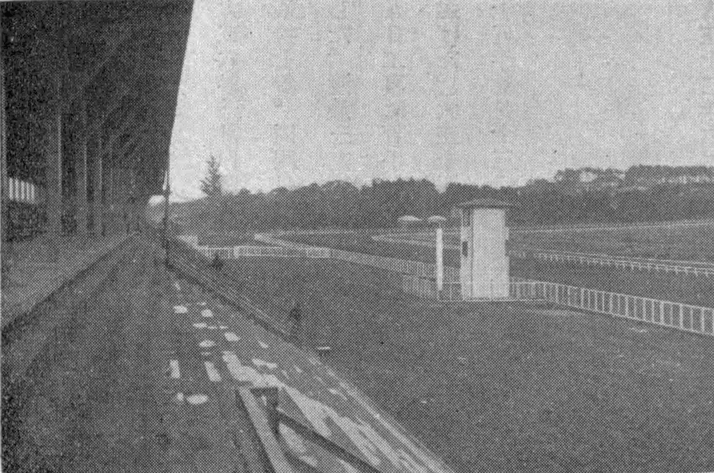 横浜市戸塚区吉田町にあった、初代 戸塚競馬場。